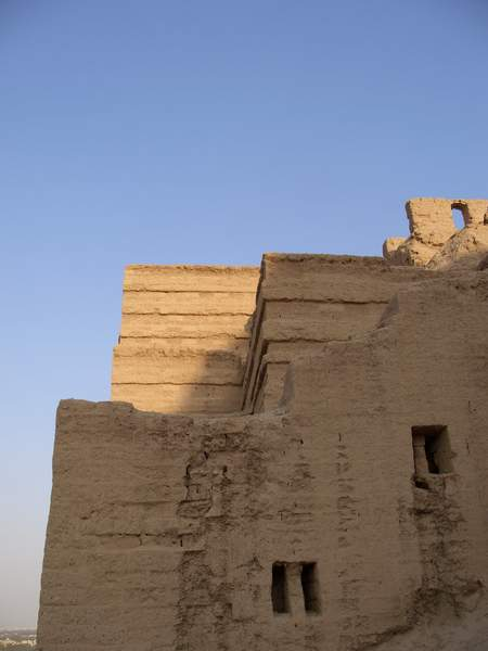 آتشگاه اصفهان-بخشِ شمالي بنا